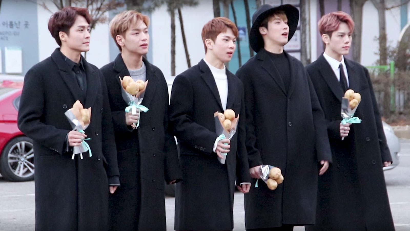 180112 KBS 뮤직뱅크 출근길